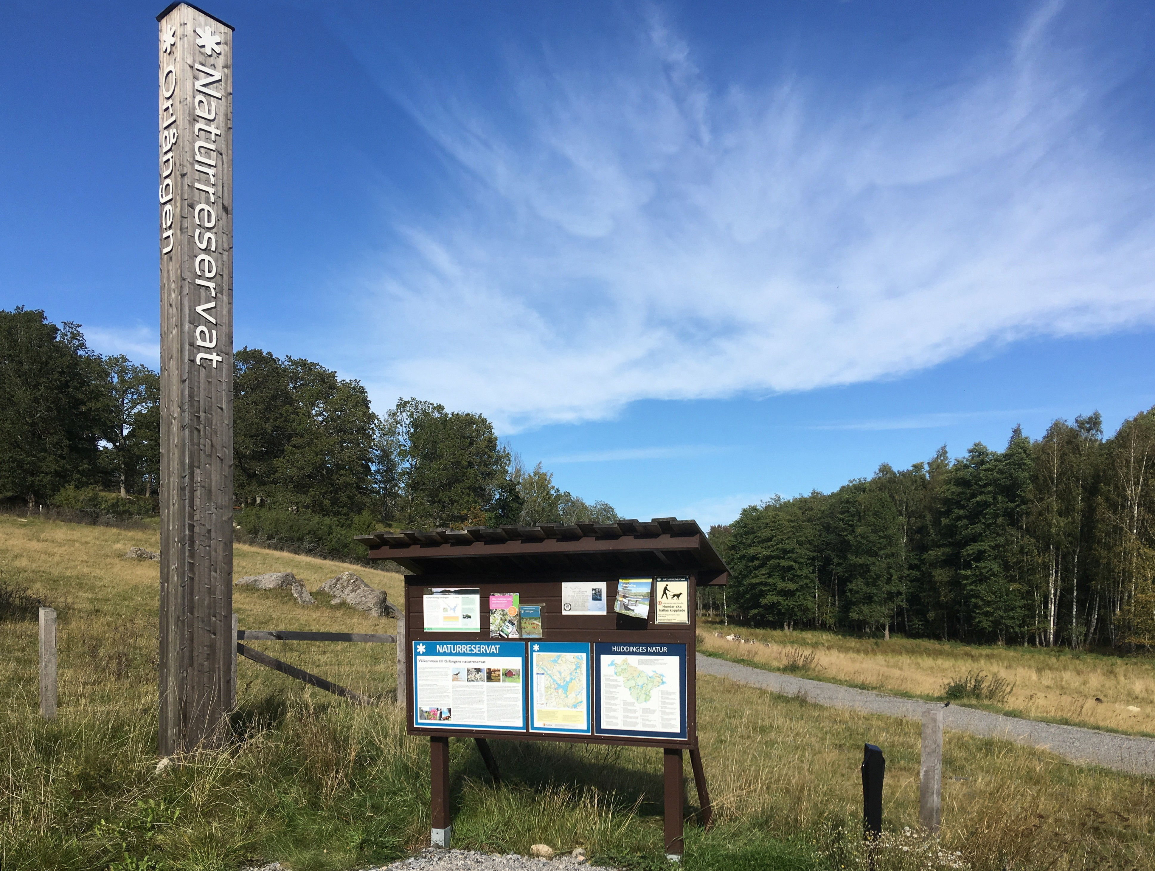 Entré till Orlångens naturreservat